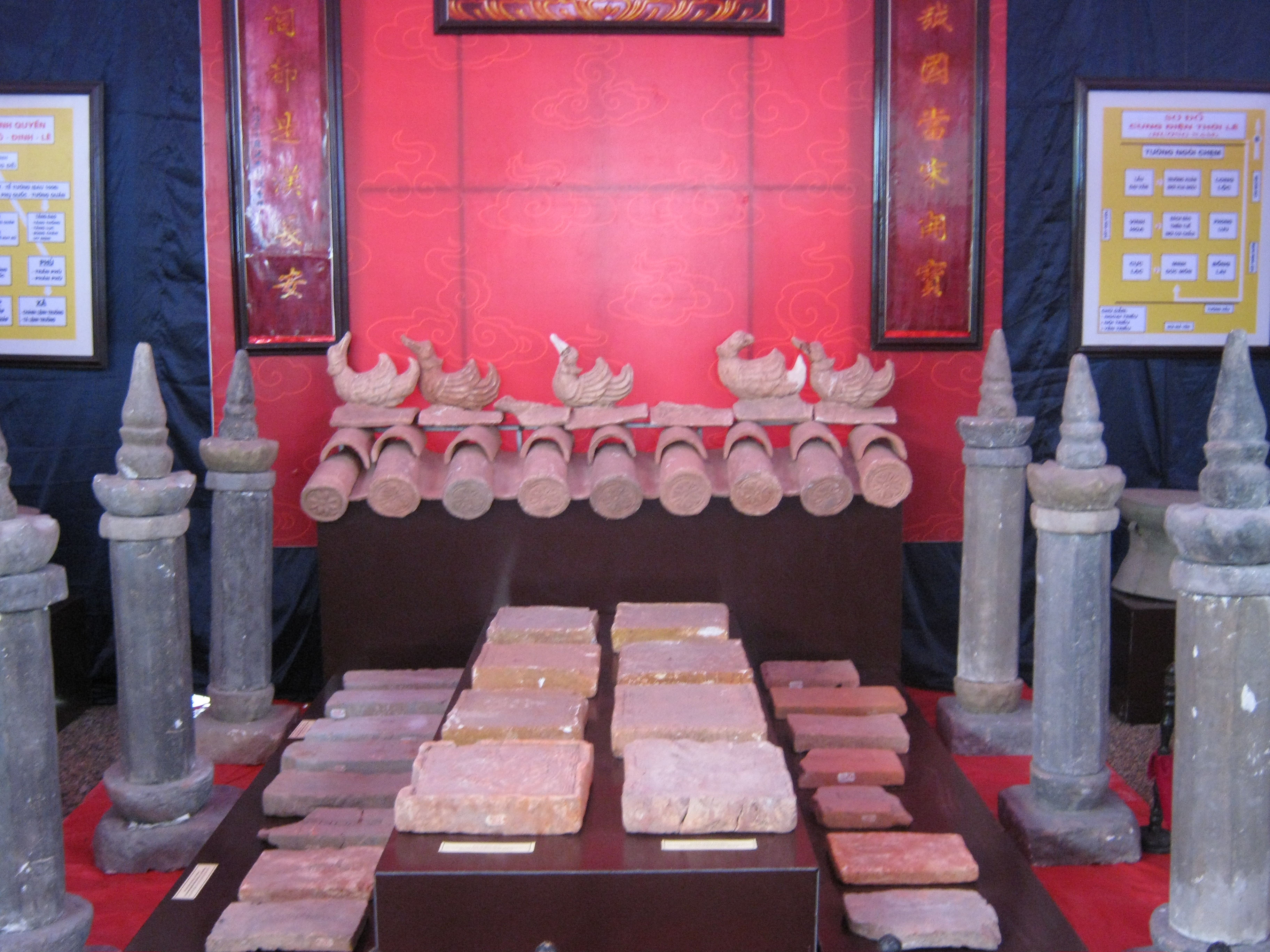 Đệ tử Suy thành Thuận Hóa, Tĩnh Hải quân Tiết độ sứ, đặc tiến Kiểm hiệu Thái sư, thực ấp nhất vạn hộ, Nam Việt vương Đinh Khuông Liễn, sở vi vong đệ Đại đức Đính Noa Tăng Noa bất vi trung hiếu phục sự thượng phụ cập trưởng huynh, khước hành ác tâm, vi bội nhược ái khoan dung, huynh hư trước tạo thứ sở dĩ tổn hại Đại đức Đính Noa Tăng Noa tính mệnh, yếu thành gia quốc vĩnh bá môn phong. Cổ ngôn tranh quan bất nhượng vị, tiên hạ thủ vi lương, trí dĩ như tư. Kim nguyện tạo bảo tràng nhất bách tọa, tiến bạt vong đệ cập tiên vong hậu một nhất hạ thoát, miễn cánh chấp tụng. Tiên chúc Đại Thắng Minh hoàng đế, vĩnh bá thiên Nam, hằng an bảo vị (Đệ tử là Suy thành Thuận Hóa, Tĩnh Hải quân Tiết độ sứ, đặc tiến Kiểm hiệu Thái sư, thực ấp một vạn hộ, Nam Việt vương Đinh Khuông Liễn, vì vong đệ là Đại đức Đính Noa Tăng Noa không làm điều trung hiếu, không thờ anh và cha, lại có lòng ác, trái với sự yêu thương và khoan dung, anh không thể bỏ qua, nên đã làm tổn hại đến tính mệnh của Đại đức Đính Noa Tăng Noa, để trọn vẹn tình nhà nghĩa nước. Lời người xưa rằng, đã tranh quan thì không nhường, ra tay trước mới là hay, đến nỗi ra tình hình như vậy. Nay nguyện làm 100 cột kinh để cúng cho vong đệ và những hồn ma của người chết trước đây và sau này, cầu cho tất cả giải thoát, không phải tranh giành kiện tụng. Trước hết là chúc cho Đại Thắng Minh hoàng đế, mãi mãi làm chủ trời Nam, giữ yên ngôi báu).